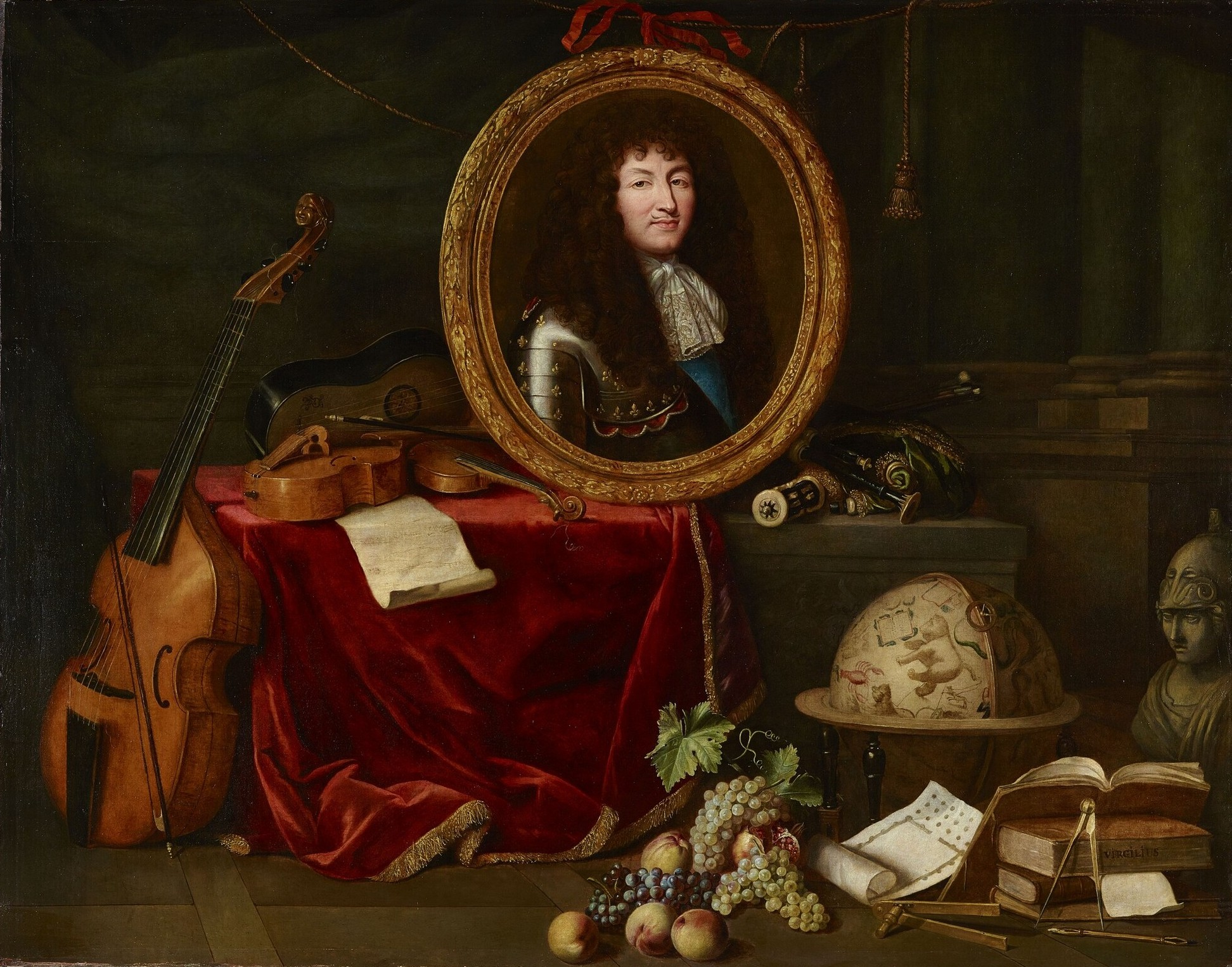 morceau de réception à l'Académie royale de peinture et de sculpture, 1672